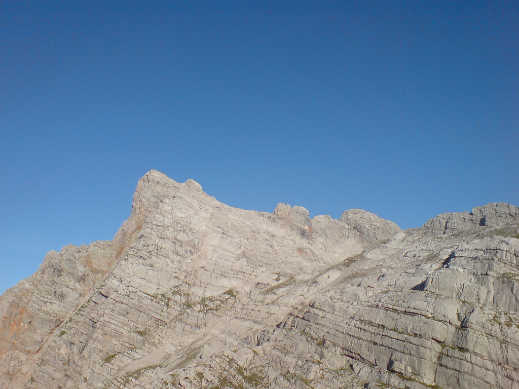 Breithorn vom Riemannhaus gesehen